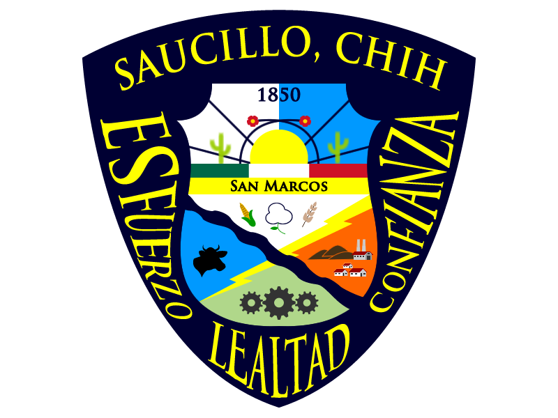 Escudo del municipio de Saucillo: En su interior se dibujan dos cuarteles divididos por los colores de la bandera mexicana y por una franja amarilla, con el nombre de la hacienda que le dio origen: San Marcos. En el cuartel superior un sol que simboliza vida y del cual brotan rosales, en alusión al municipio de Rosales, del cual proceden los actuales habitantes desde 1850. En el interior se observan cuatro secciones divididas por el río Conchos y el rayo de energía eléctrica de Rosetilla, cada uno tiene un color distinto, los cuales representan las cuatro estaciones del año. En ellos se hizo alusión a los productos del municipio: para representar a la agricultura se dibuja una mazorca, un capullo de algodón y una espiga de trigo. Para la industria, unos engranes; la ganadería se representa con una cabeza de bovino y la minería con cerros, torres y una casa.